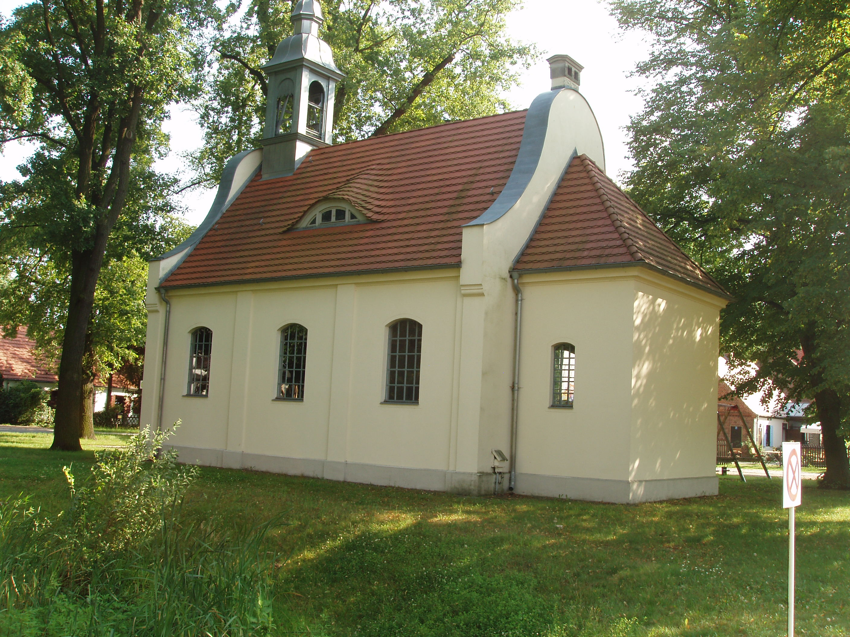 Die Dorfkapelle wurde 1904/1905 erbaut